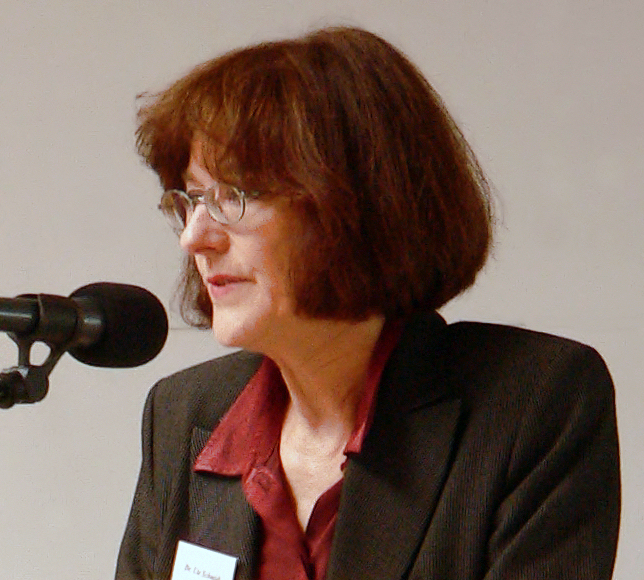 Ute Schmidt